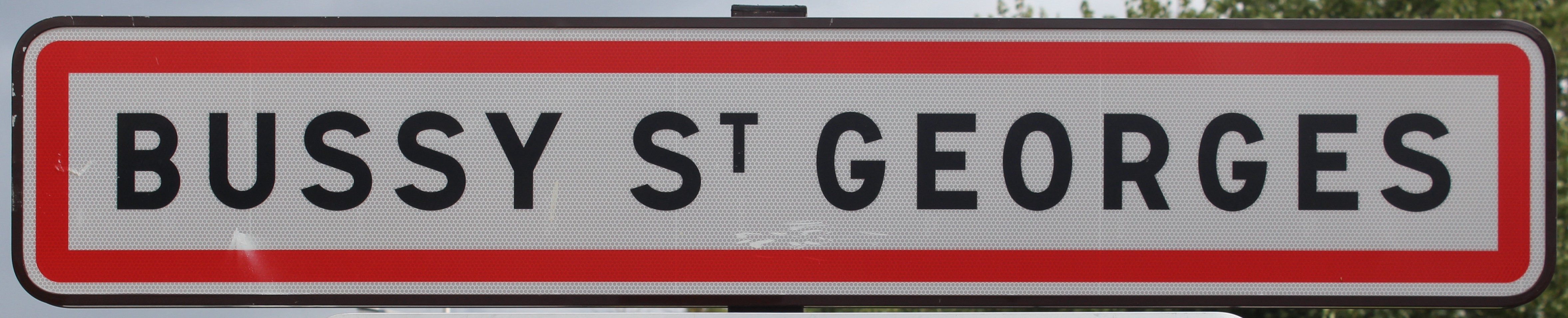 Panneau d'entrée dans Bussy-Saint-Georges.